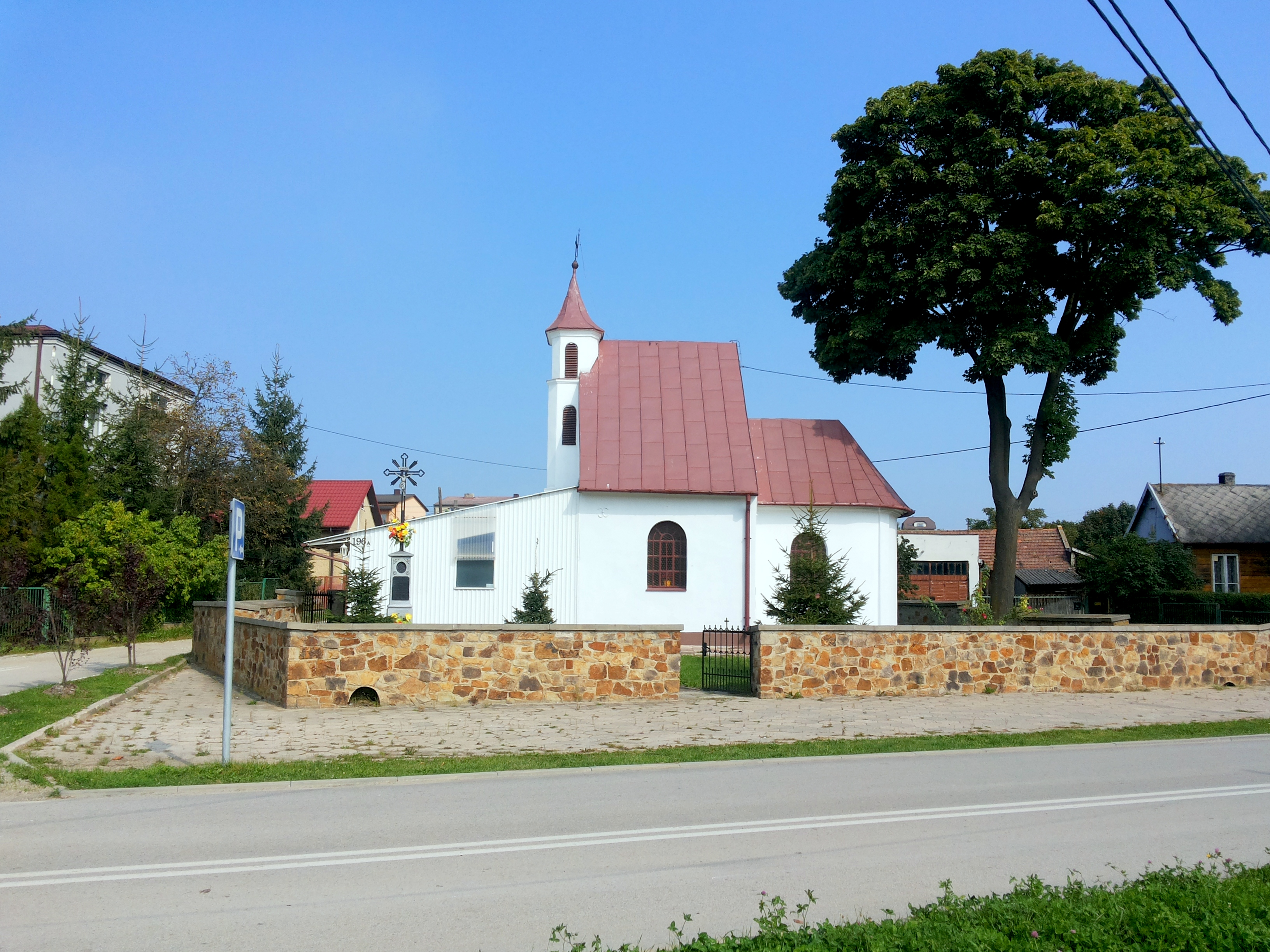 Domaszowice – Stara Wieś, zespół kaplicy